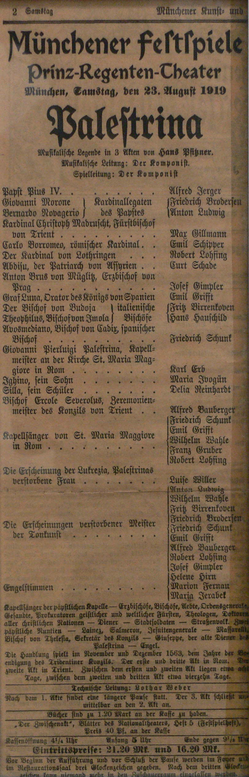 Theaterzettel zur Aufführung von Pfitzners Palestrina unter der Leitung des Komponisten, Titelrolle: Karl Erb, Prinzregententheater München, 23. August 1919 Stadtarchiv Ravensburg, Nachlass Karl Erb